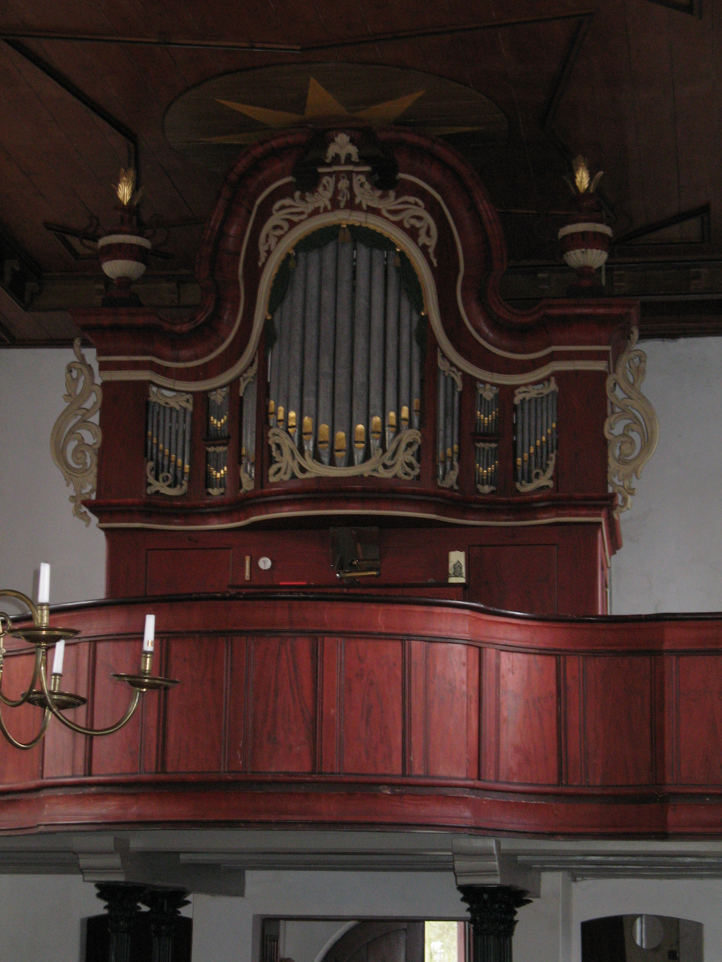 Orgel in Westerende von Johann Friedrich Wenthin 1793